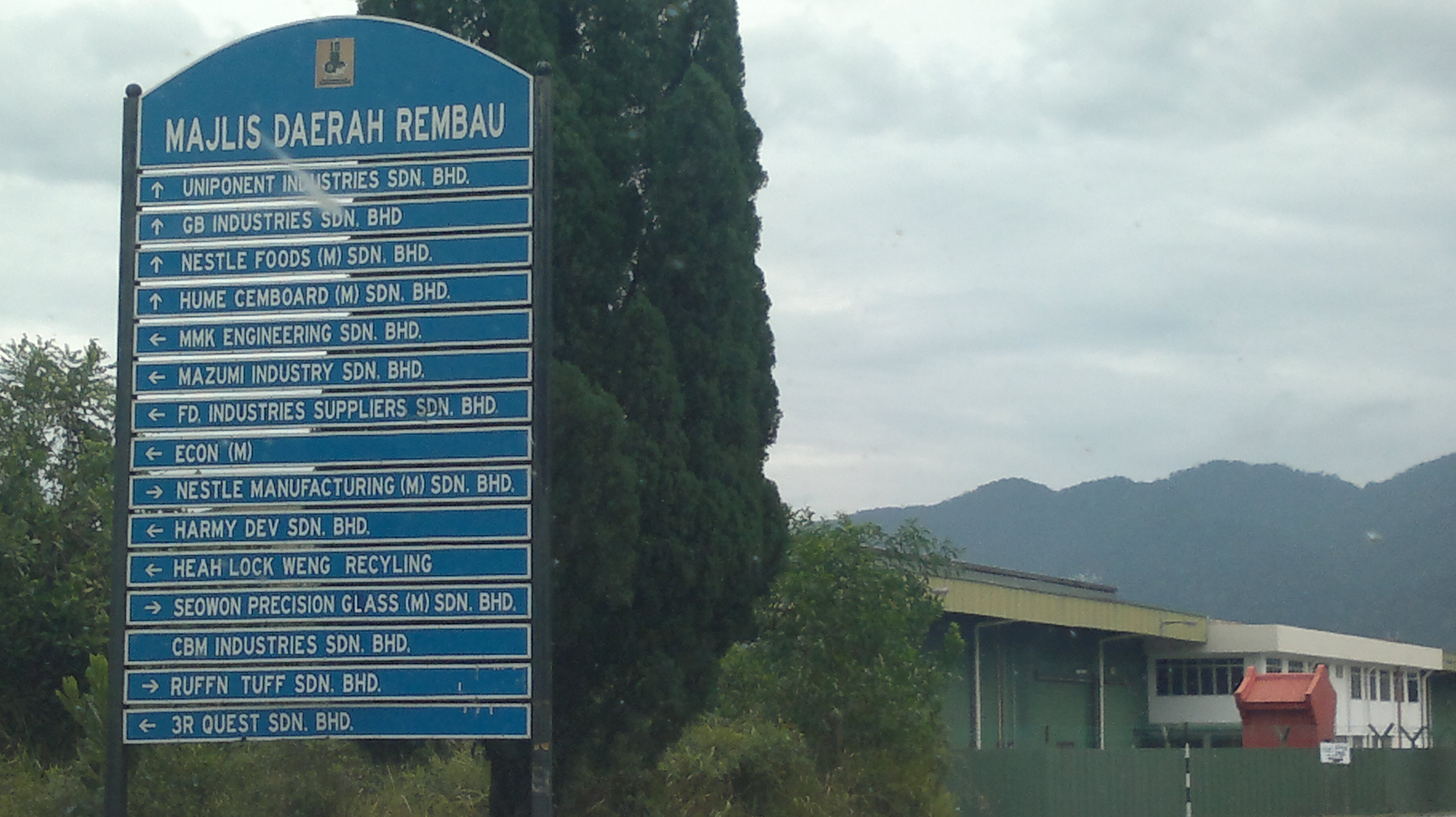 Kawasan Perindustrian Chembong, Rembau, Negeri Sembilan, Malaysia